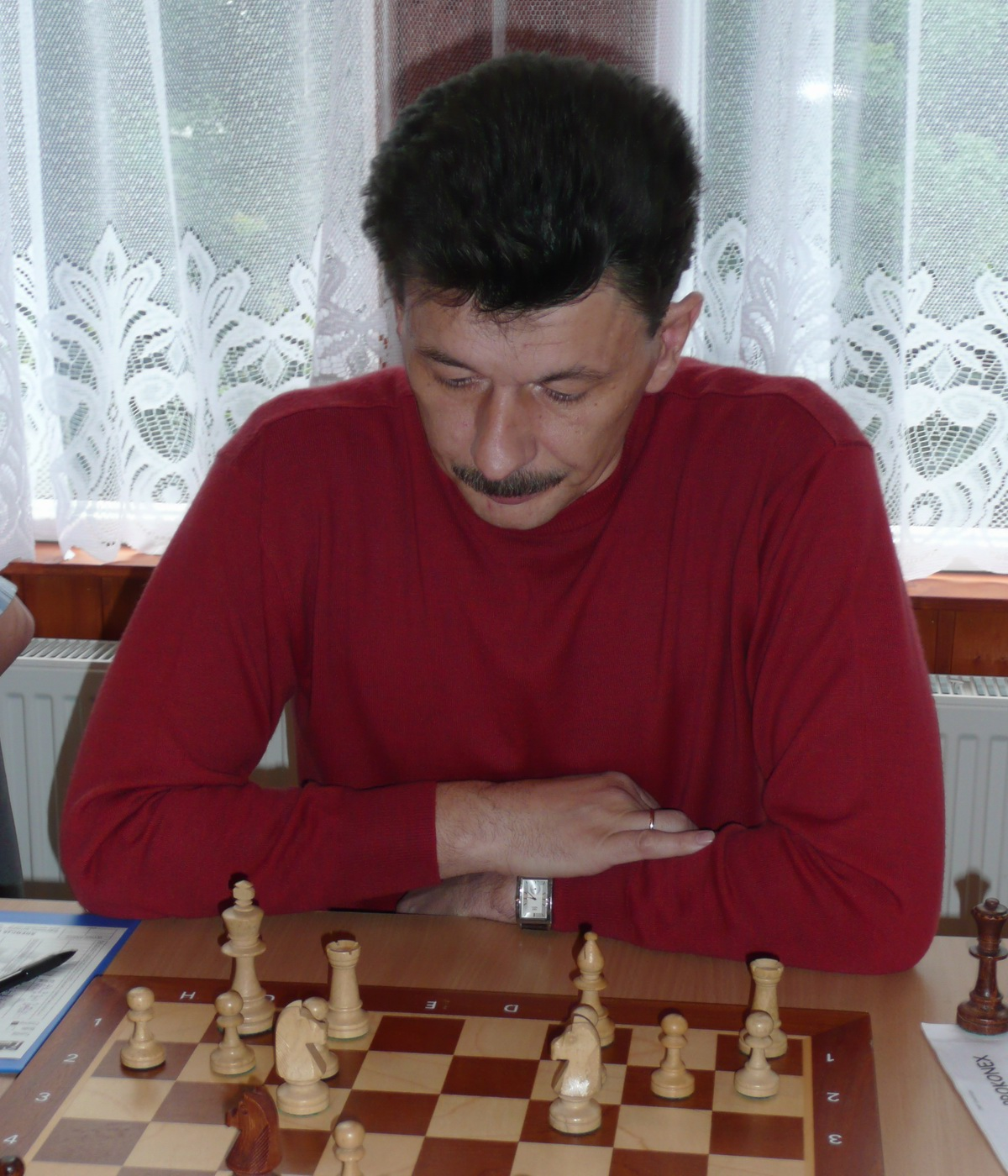 GM Andrei Kovalev, Karpacz 2008